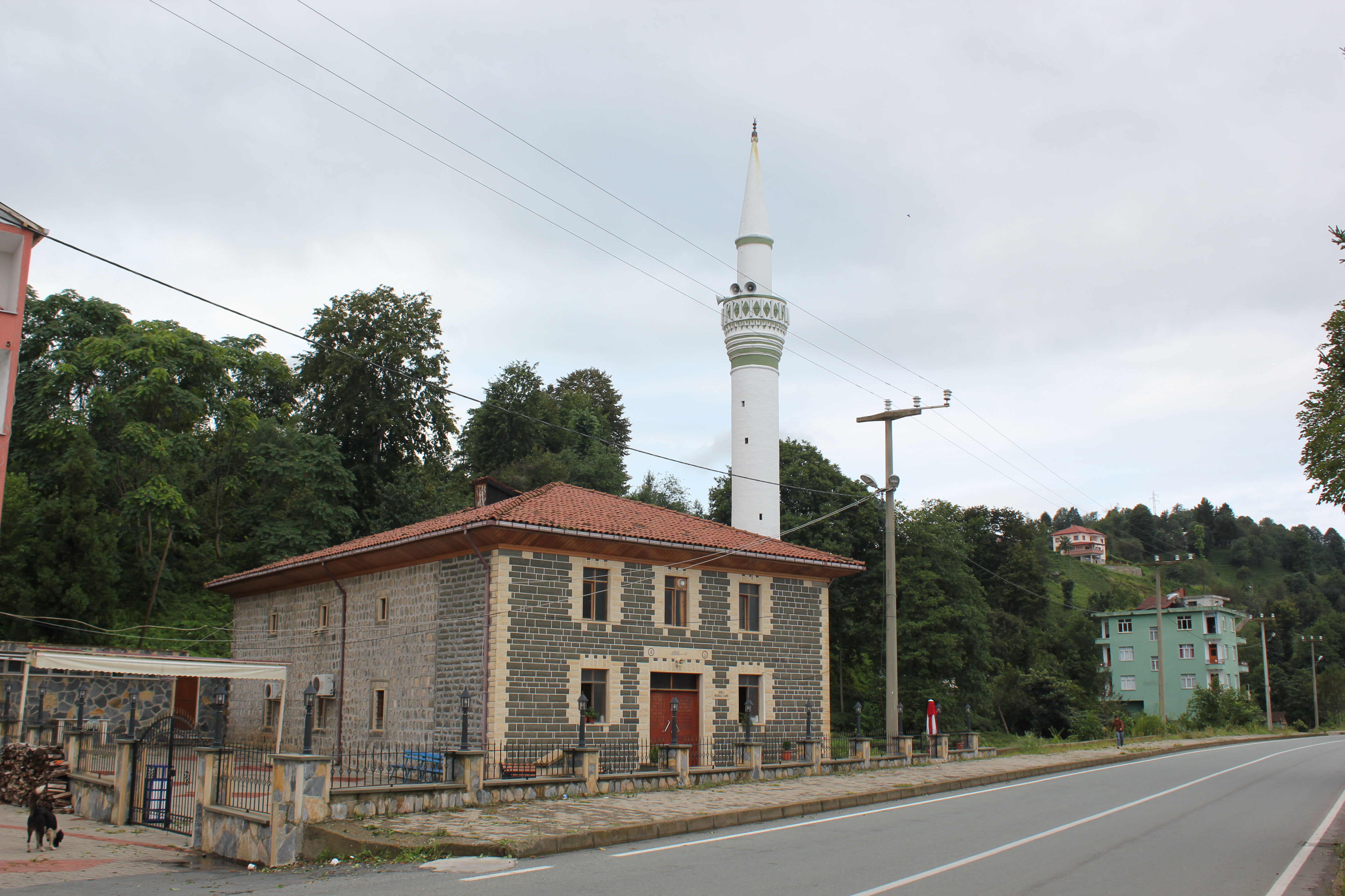 Işıklı (Ğere/Ğera) Merkez Camii, Ardeşen, Rize/Lazistan, Türkiye